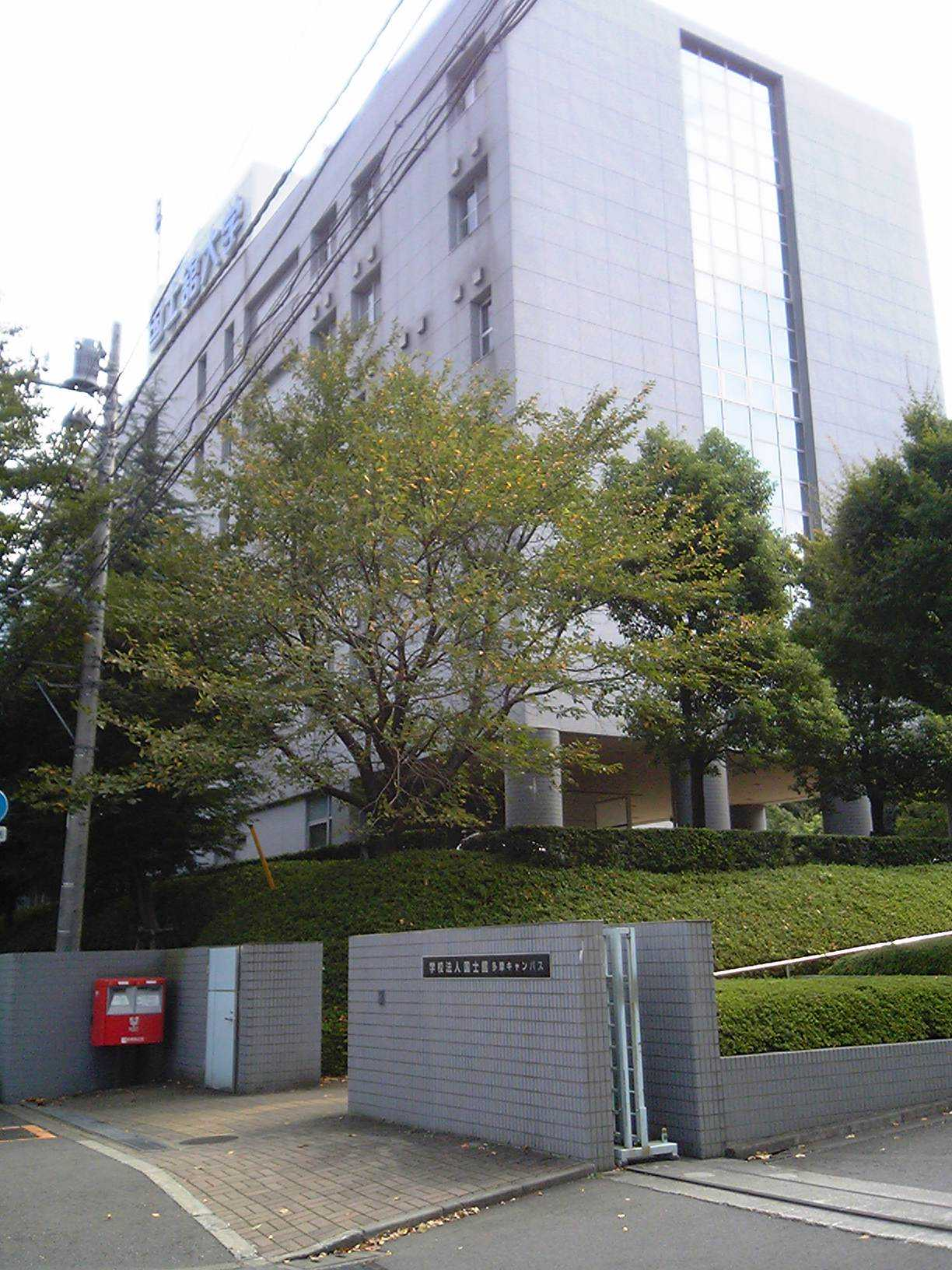 国士舘大学多摩キャンパス（2006年9月23日投稿者が撮影）